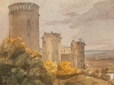 Dessin du château de Coucy, modifié par Rinaldum 12 déc 2003 à 03:01 (CET) Aquarelle sur traits à la mine de plomb ; 16,8 x 24,4 cm.